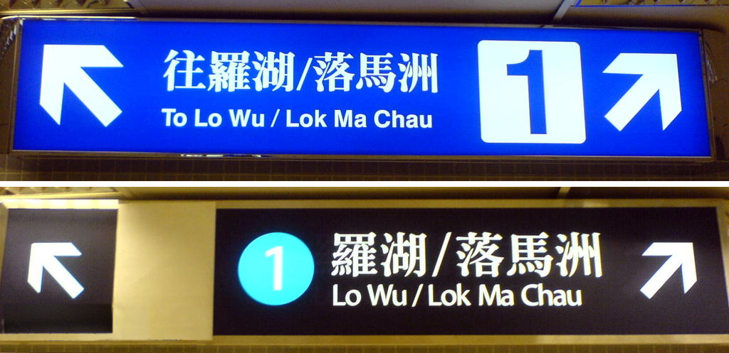 往zh:落馬洲站的指示牌已經採用zh:香港地鐵的方式。